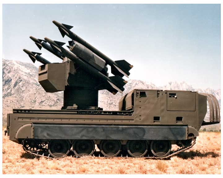 MIM-72 Chaparral